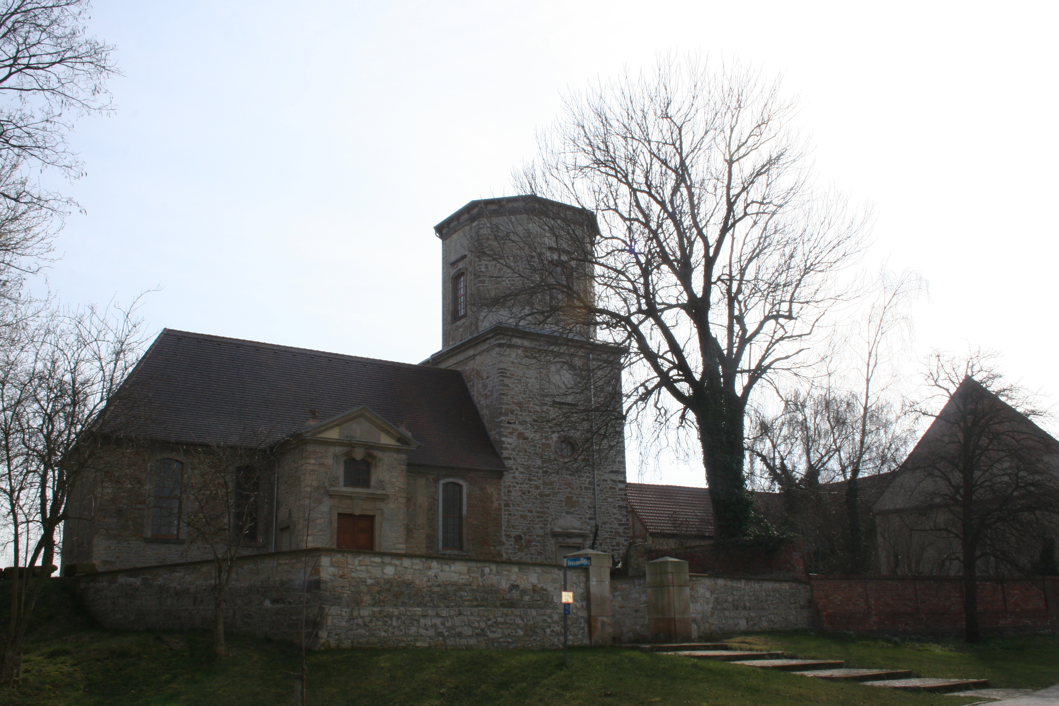 Oberbeuna Hoppenhaupt-Kirche